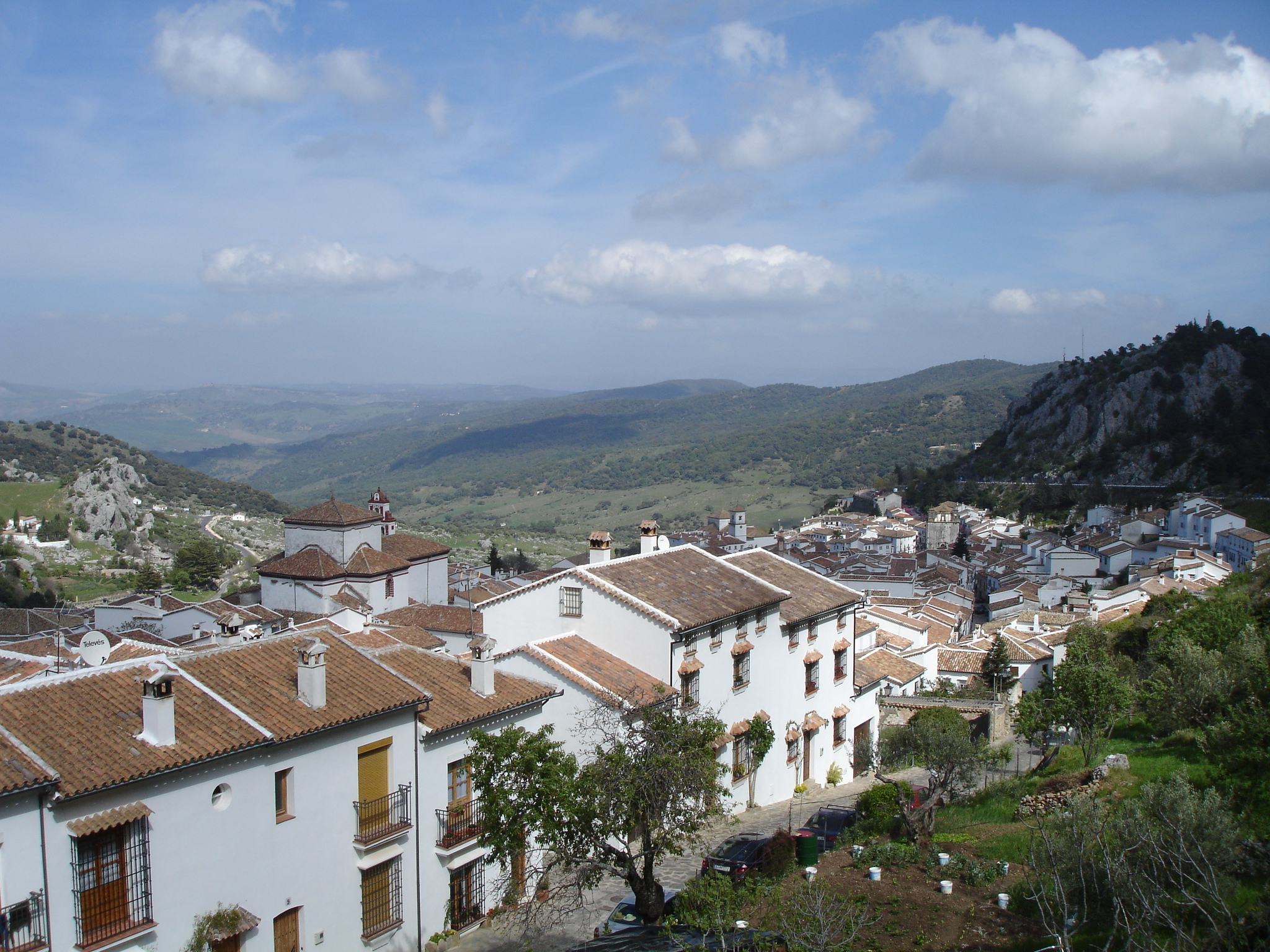 Grazalema desde el camping, Spain